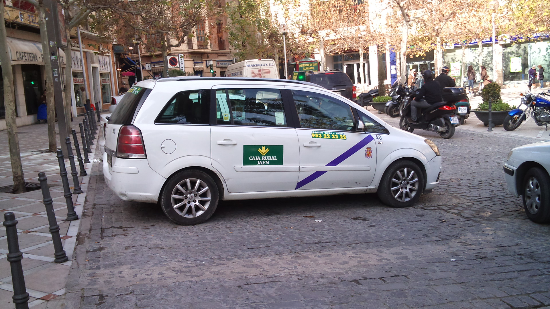 Vehículo de taxi de la ciudad de Jaén, con la característica franja morada.